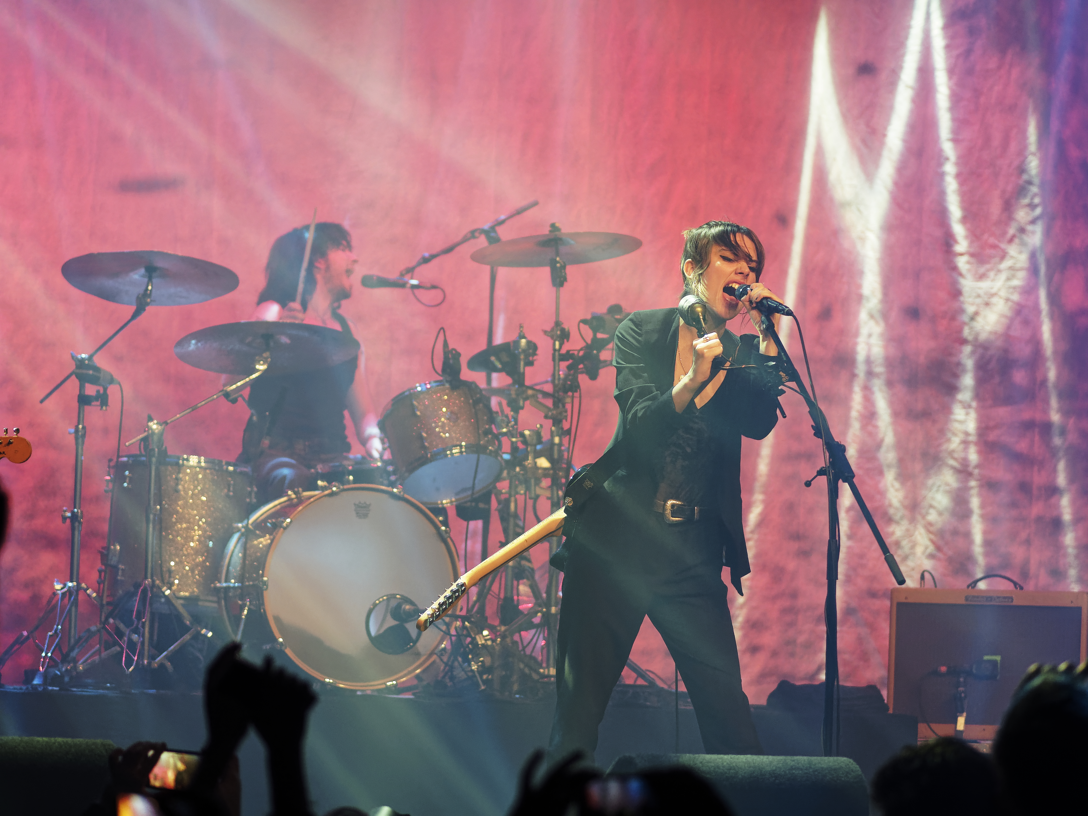 Wolf Alice in De Melkweg in Amsterdam